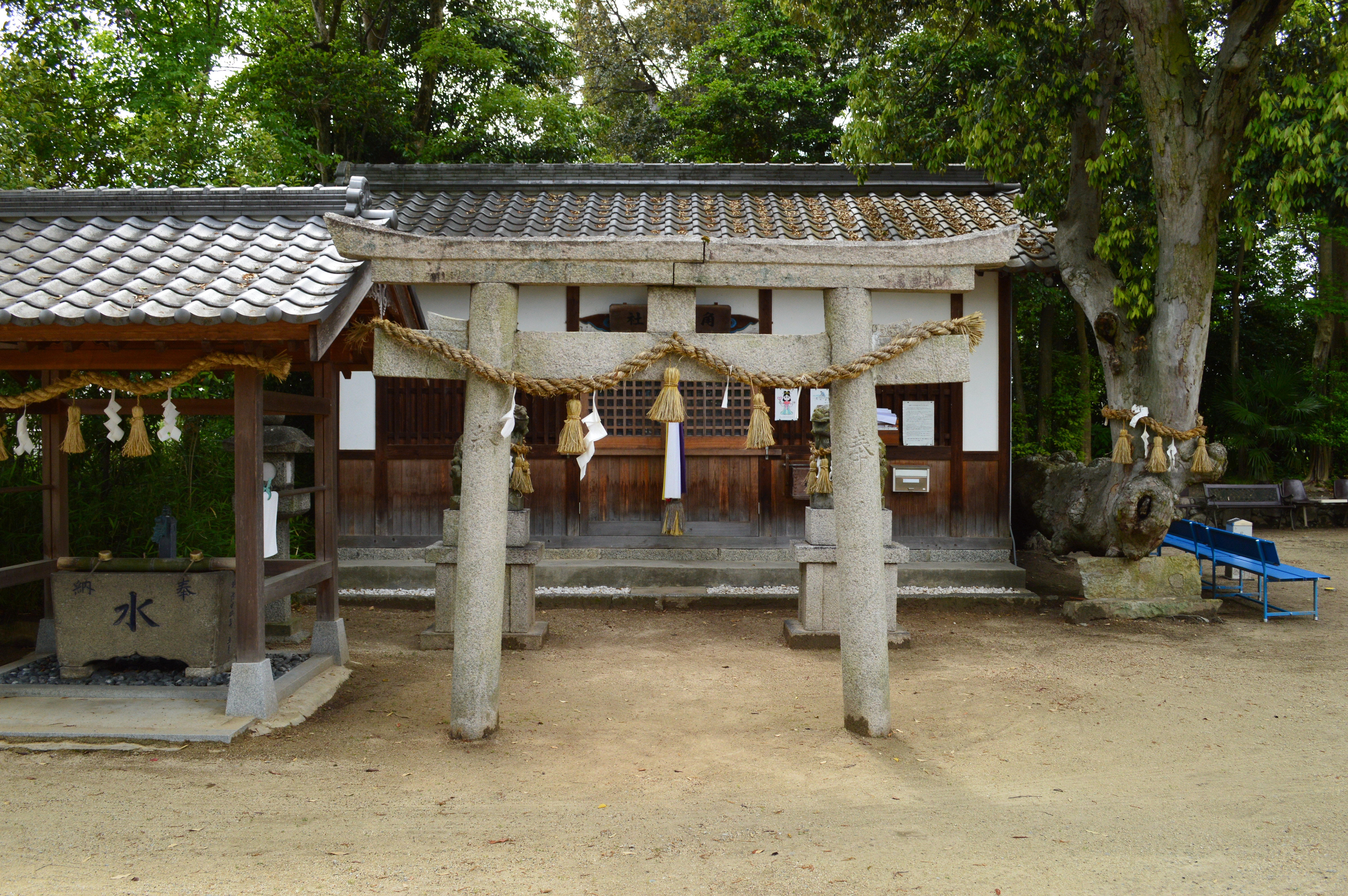 角刺神社 拝殿正面